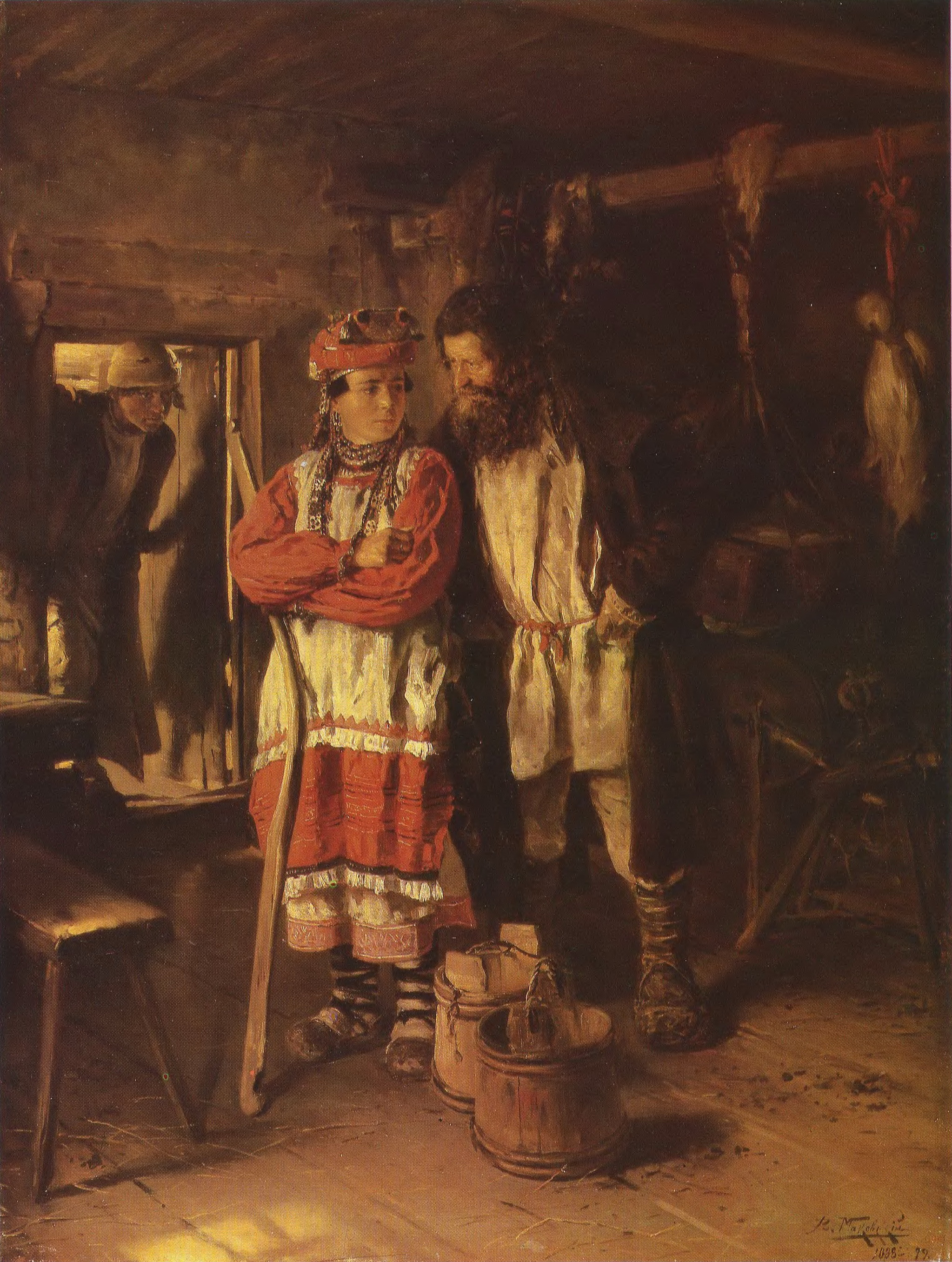 Маковский В.Е. «Свекор» 1888